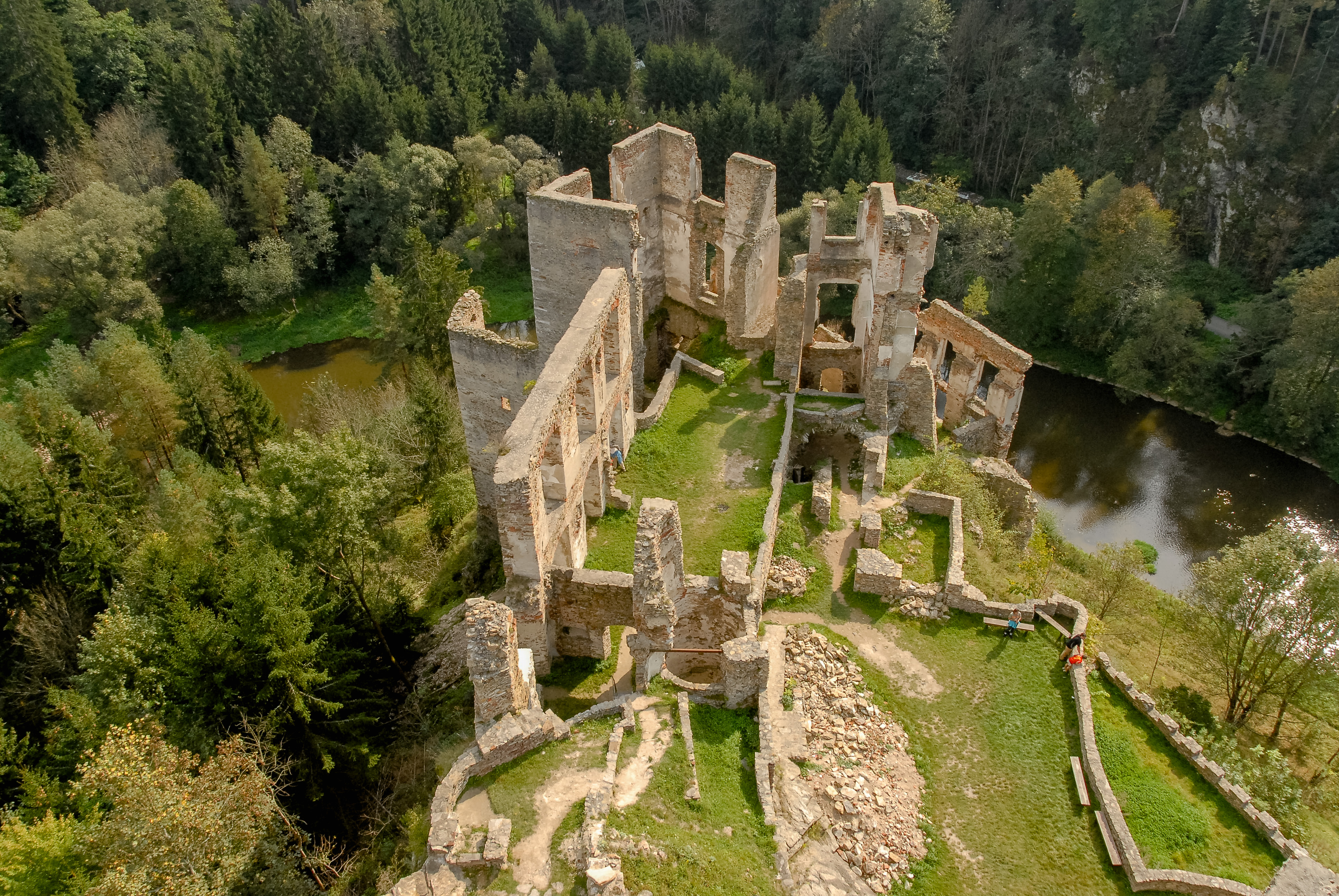 Burgruine Kollmitz mit sog. Böhmischer Mauer